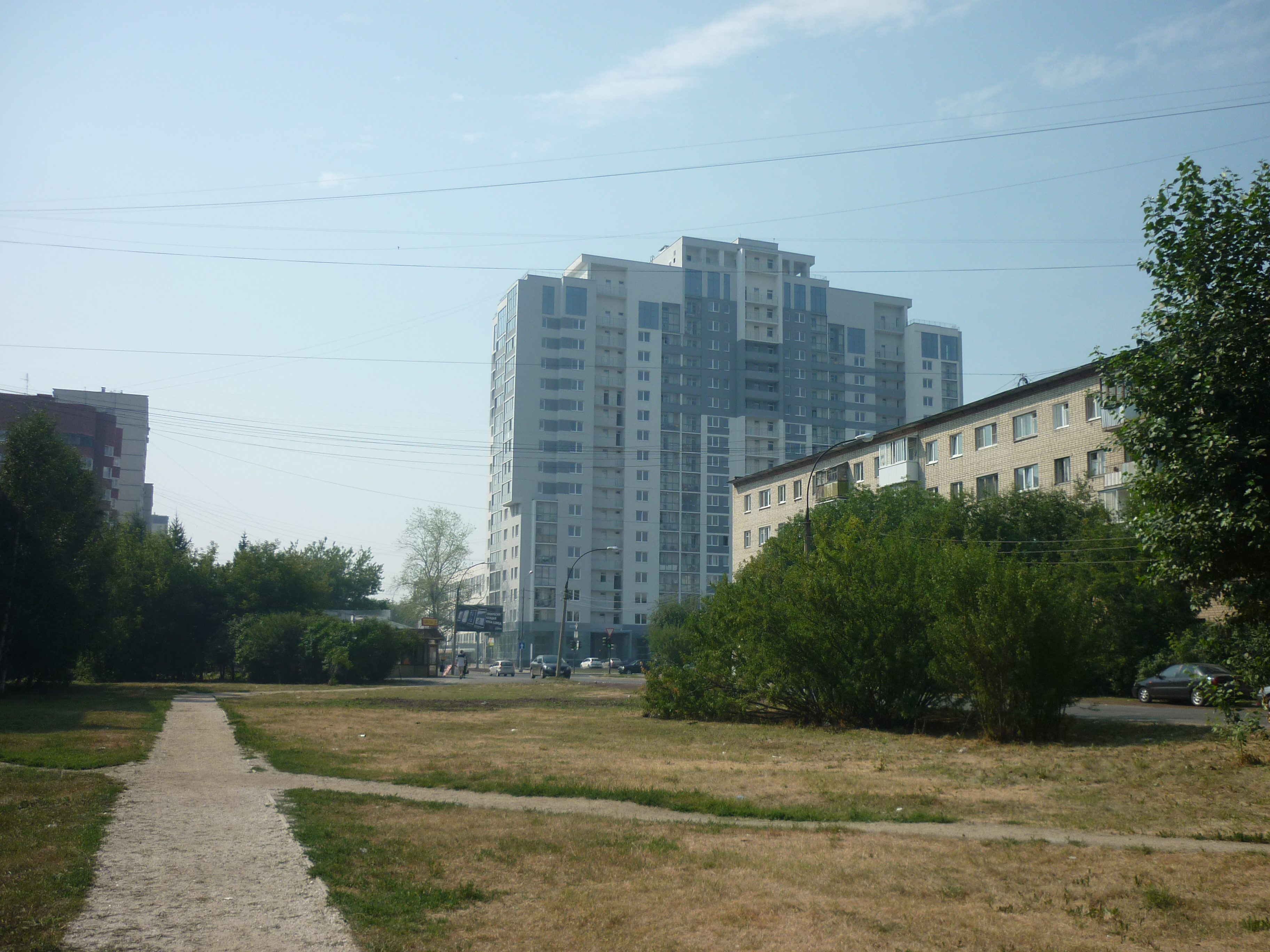 Вид на жк "Комфорт" на пересечении Фурманова-Серова. Снято на улице Серова. 56.8155565, 60.5966432